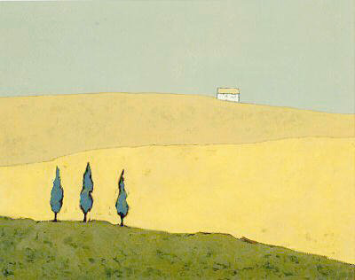 נוף דיונות